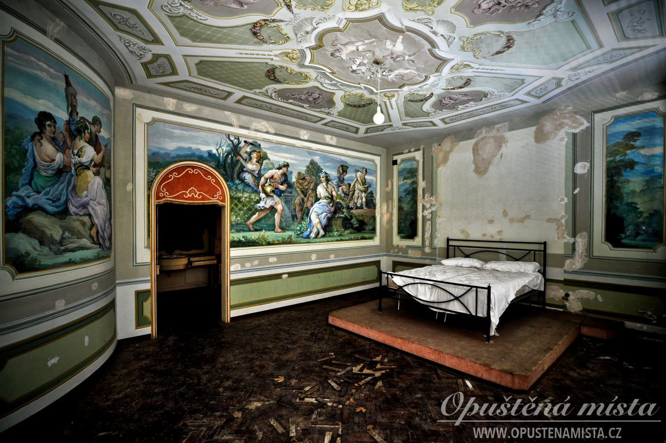 Na první pohled stroze vypadající vila ukrývá bohatě zdobené interiéry. Koupelny a krby jsou z mramoru se zlatými detaily, na stěnách ložnice se odehrávají různé výjevy na zdařilých freskách, okna jsou doplněná pestrobarevnými závěsy a štukové stropy bývaly plné křišťálových lustrů.